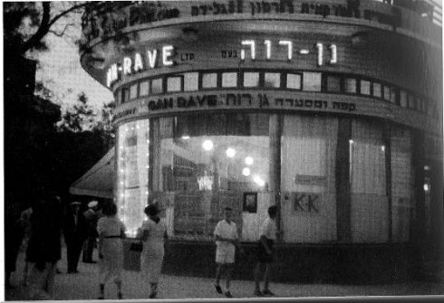 Gan Rave Cafe in Tel Aviv (2 Bialik St) in 1933